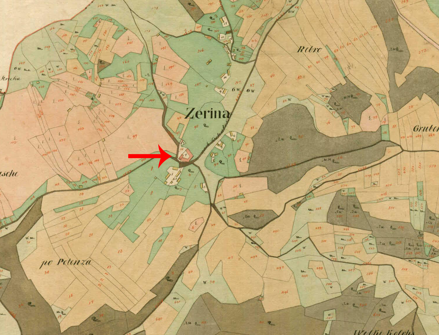 Franciscejski kataster za Kranjsko, 1823-1869